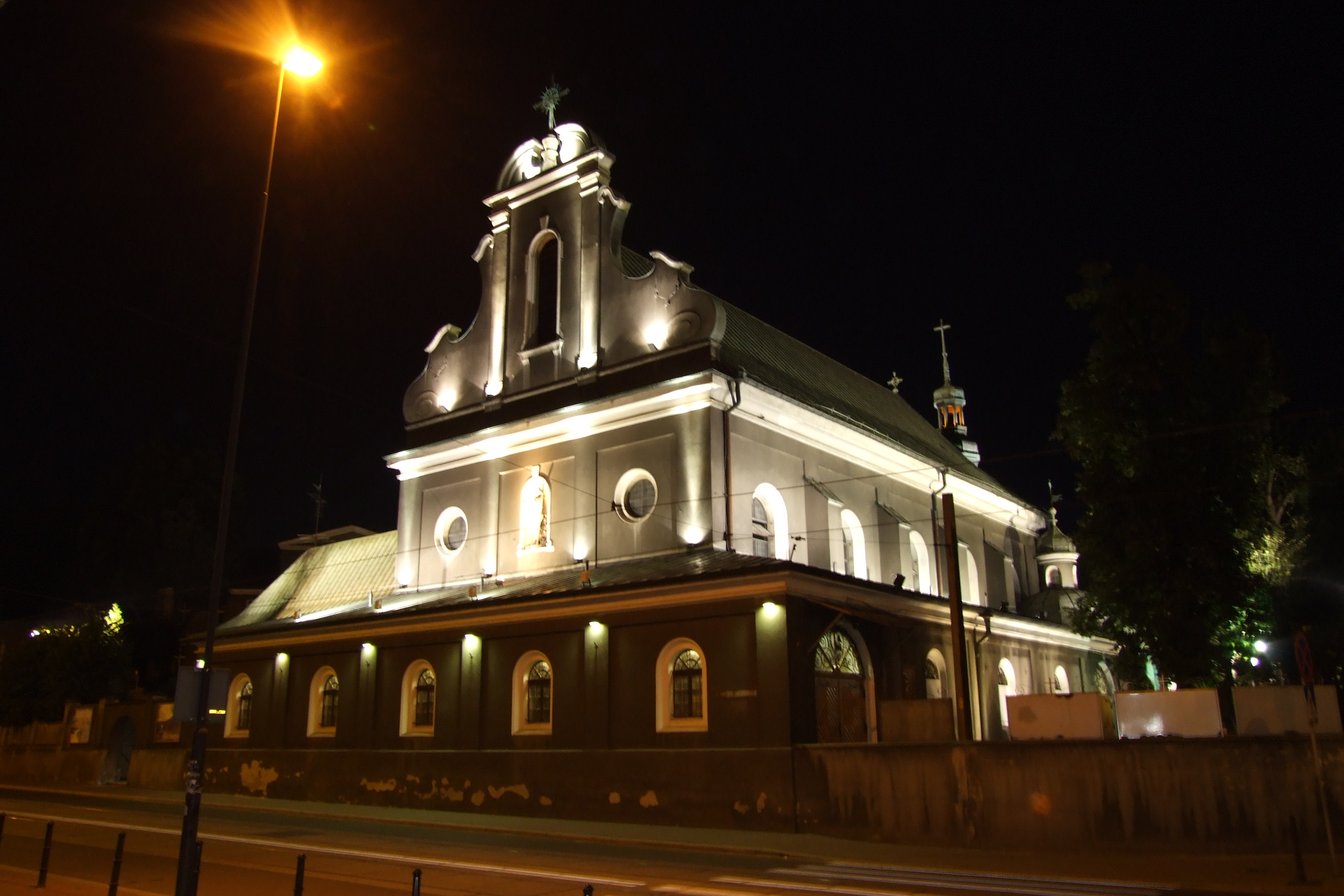 Kościół Podwyższenia Krzyża Świętego w Gliwicach